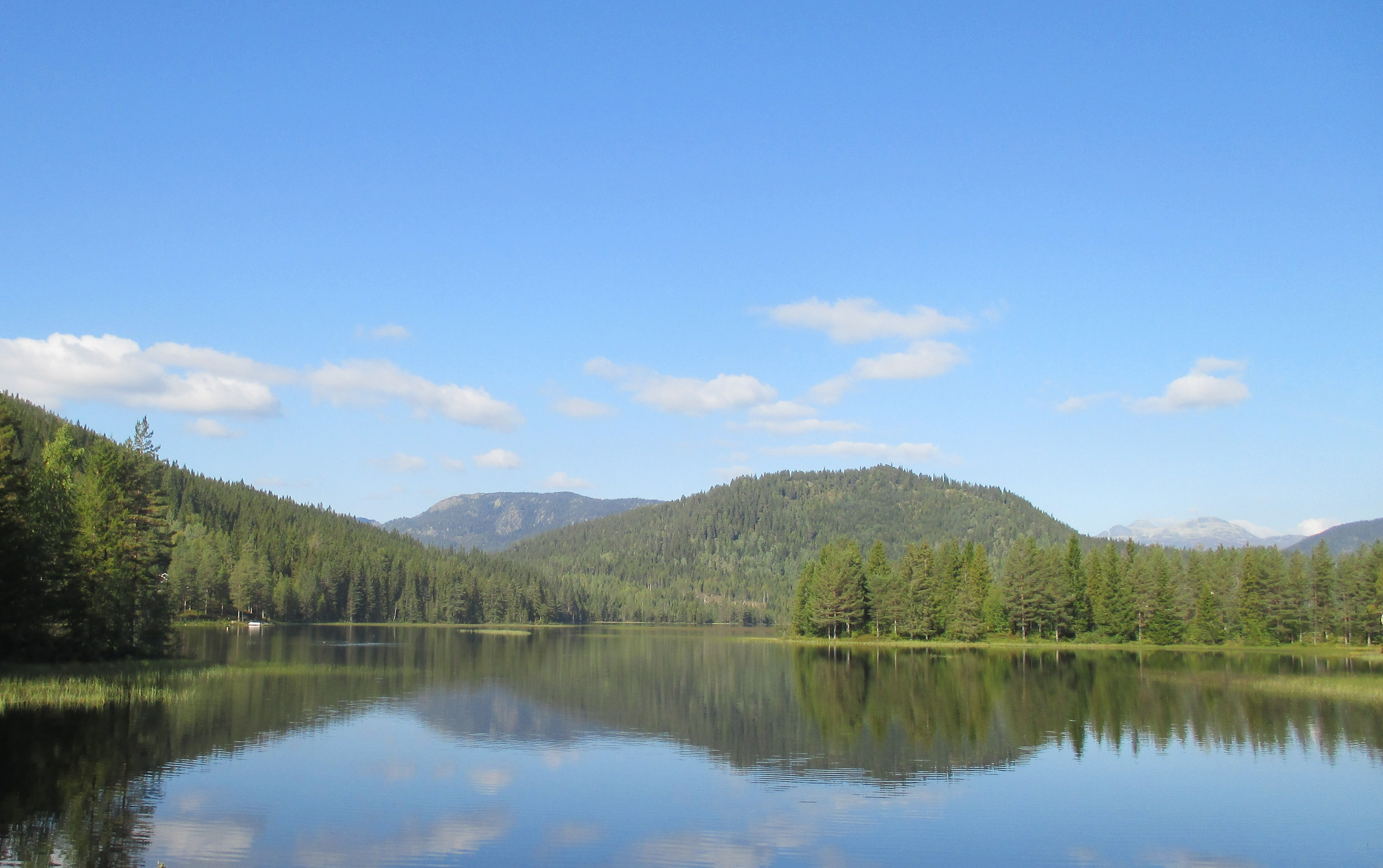 Sønnlandsvatnet